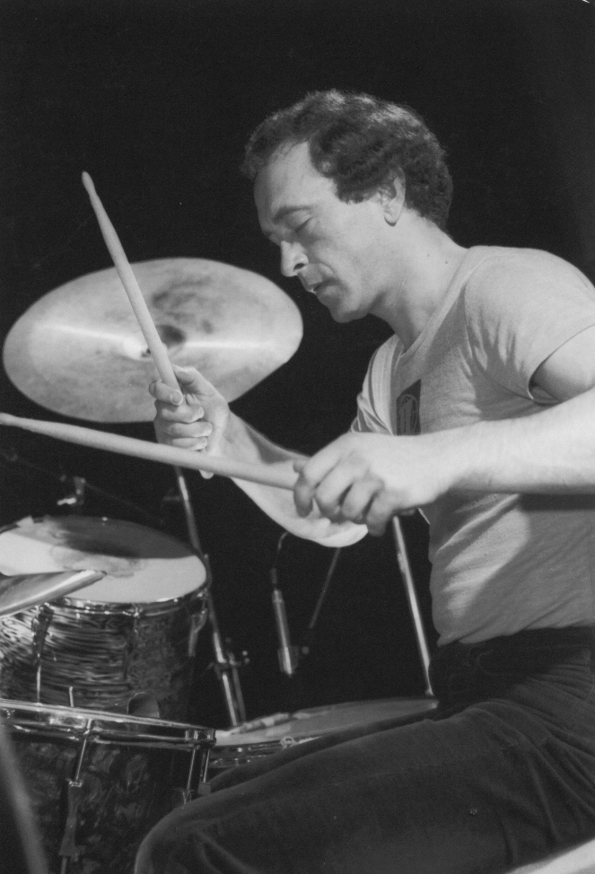 Ю. Китаев (Grey)